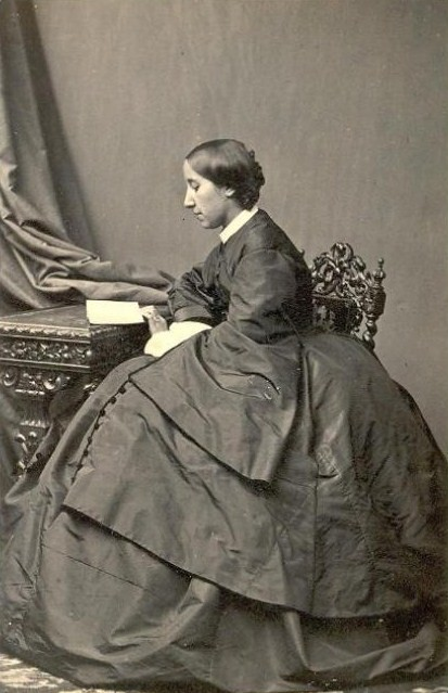 Анна Петровна Исакова, ур. Лопухина (ок. 1830—1910)